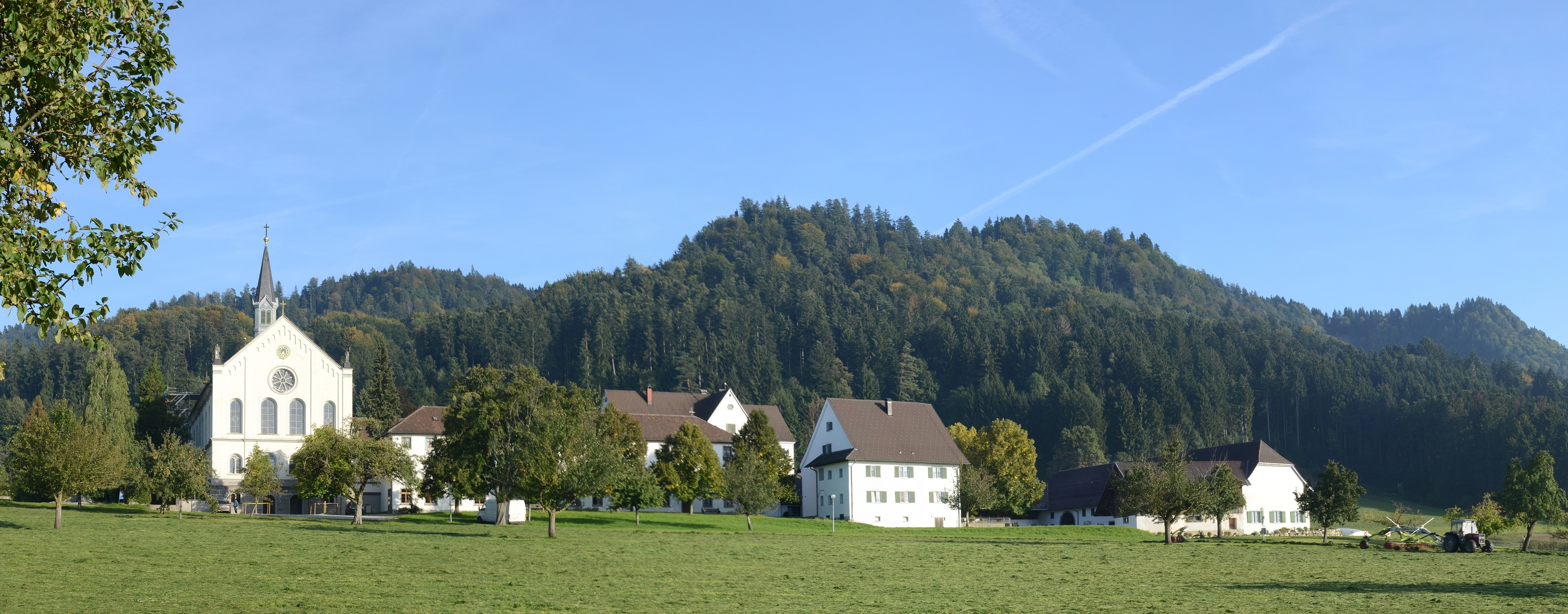 Zisterzienserinnenabtei Mariastern Kloster Maria Stern - Gwiggen in Hohenweiler, Vorarlberg. NOTE: This image is a panorama consisting of multiple frames that were merged or stitched in software. As a result, this image necessarily underwent some form of digital manipulation. These manipulations may include blending, blurring, cloning, and color and perspective adjustments. As a result of these adjustments, the image content may be slightly different than reality at the points where multiple images were combined. This manipulation is often required due to lens, perspective, and parallax distortions.